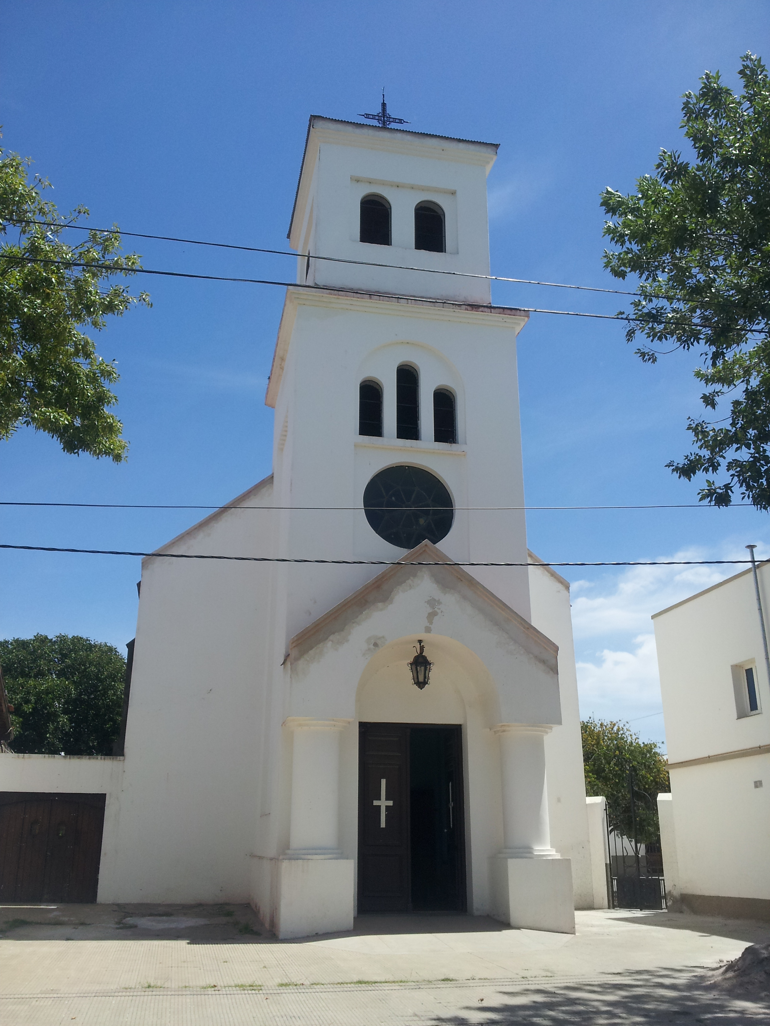 Vista de la fachada de la parroquia Nuestra Señora del Transito en Saldungaray (Provincia de Buenos Aires)